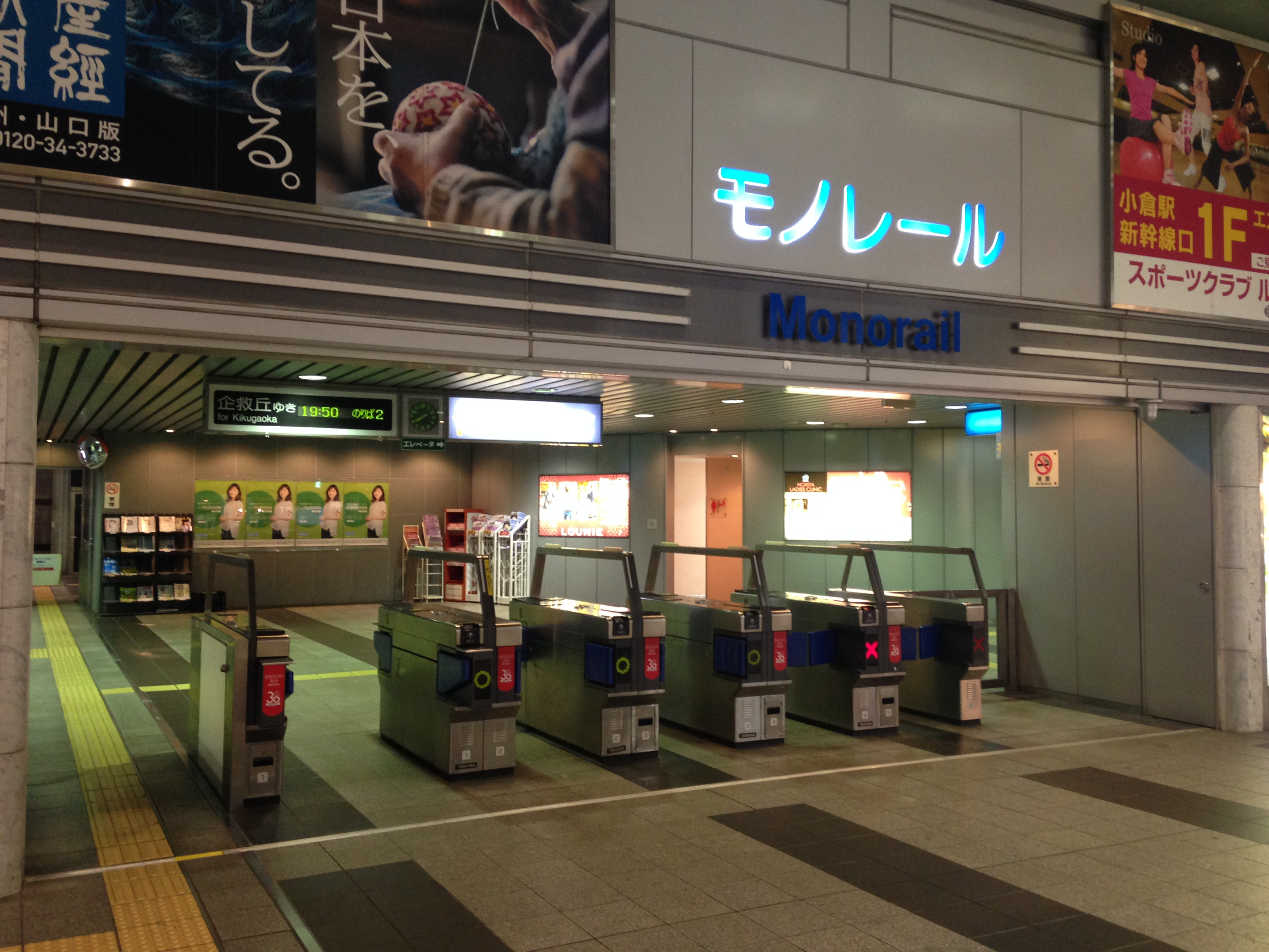 小倉駅(北九州モノレール)の改札口